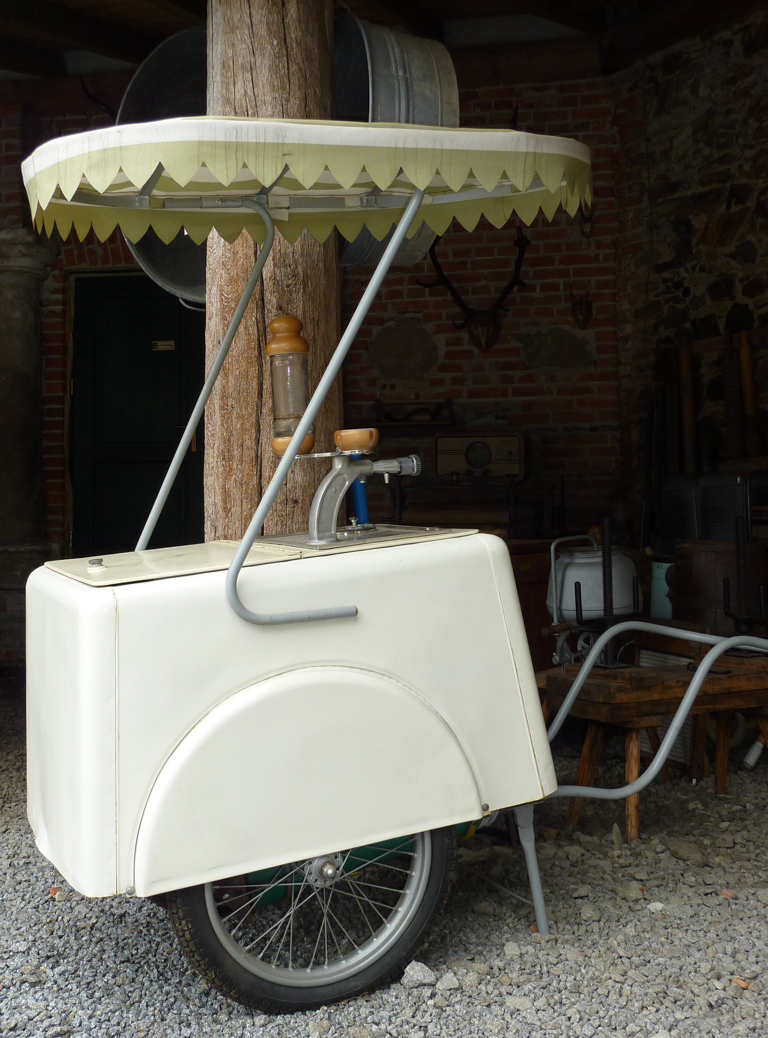 Saturator z lat 60-70 XX w. na wystawie sprzętu gospodarczego przy arboretum w Wojsławicach k. Niemczy na Dolnym Śląsku.